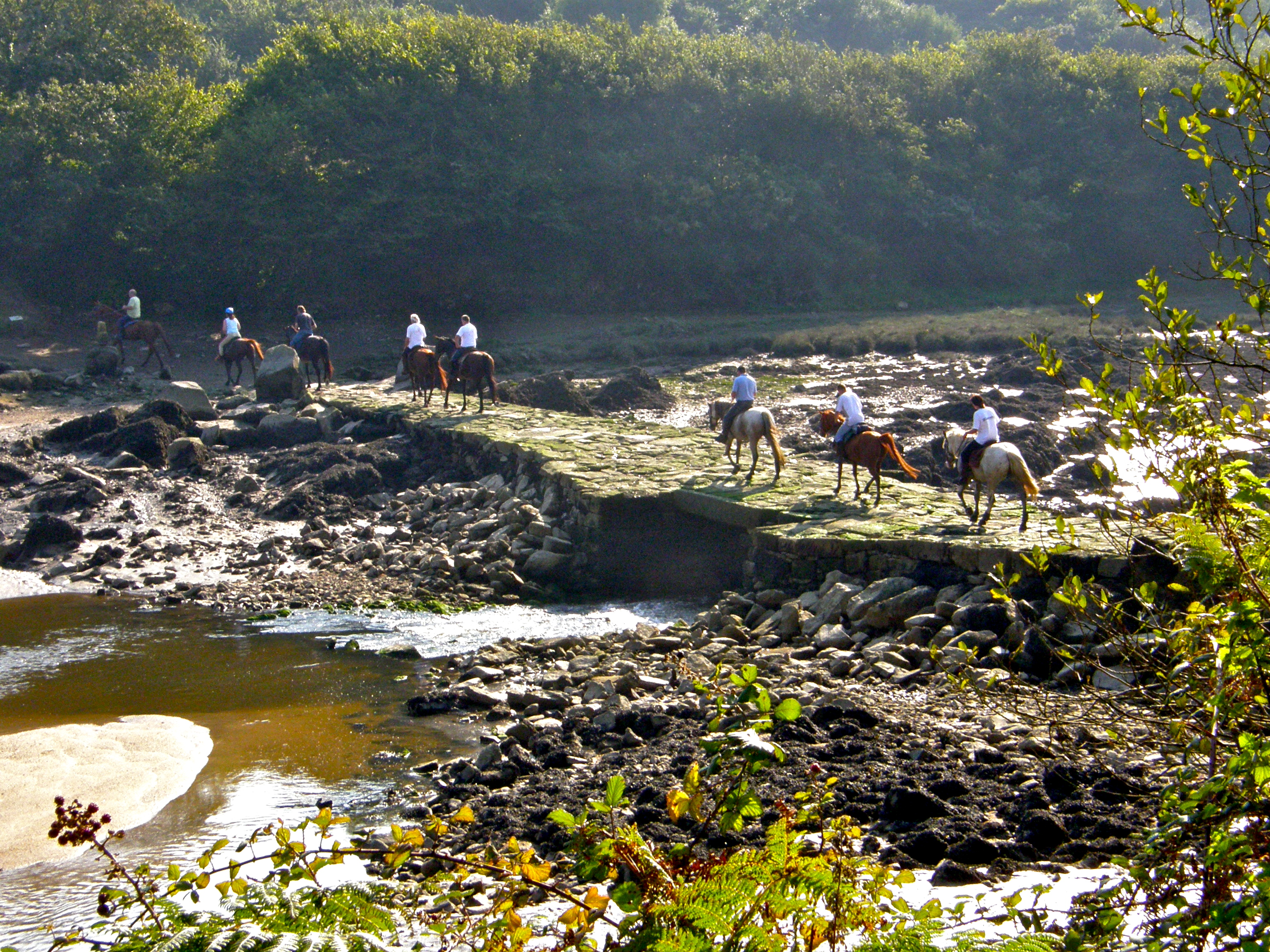 Pont Crac'h ou pont du Diable, passage à gué sur l'Aber Wrac'h à PLOUGUERNEAU